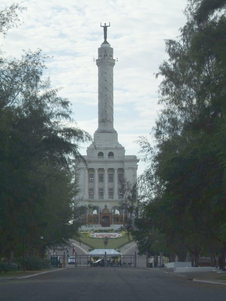 Monumento a los Héroes de la Restauración. Santiago, R.D.